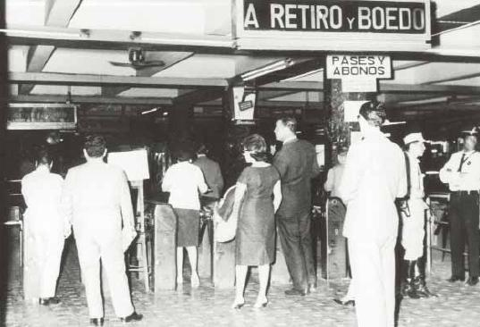 Molinetes de acceso a la estación Constitución del Subte de Buenos Aires en tiempos en que funcionaba como terminal de las líneas C y E, indicando respectivamente Retiro y Boedo como destinos.